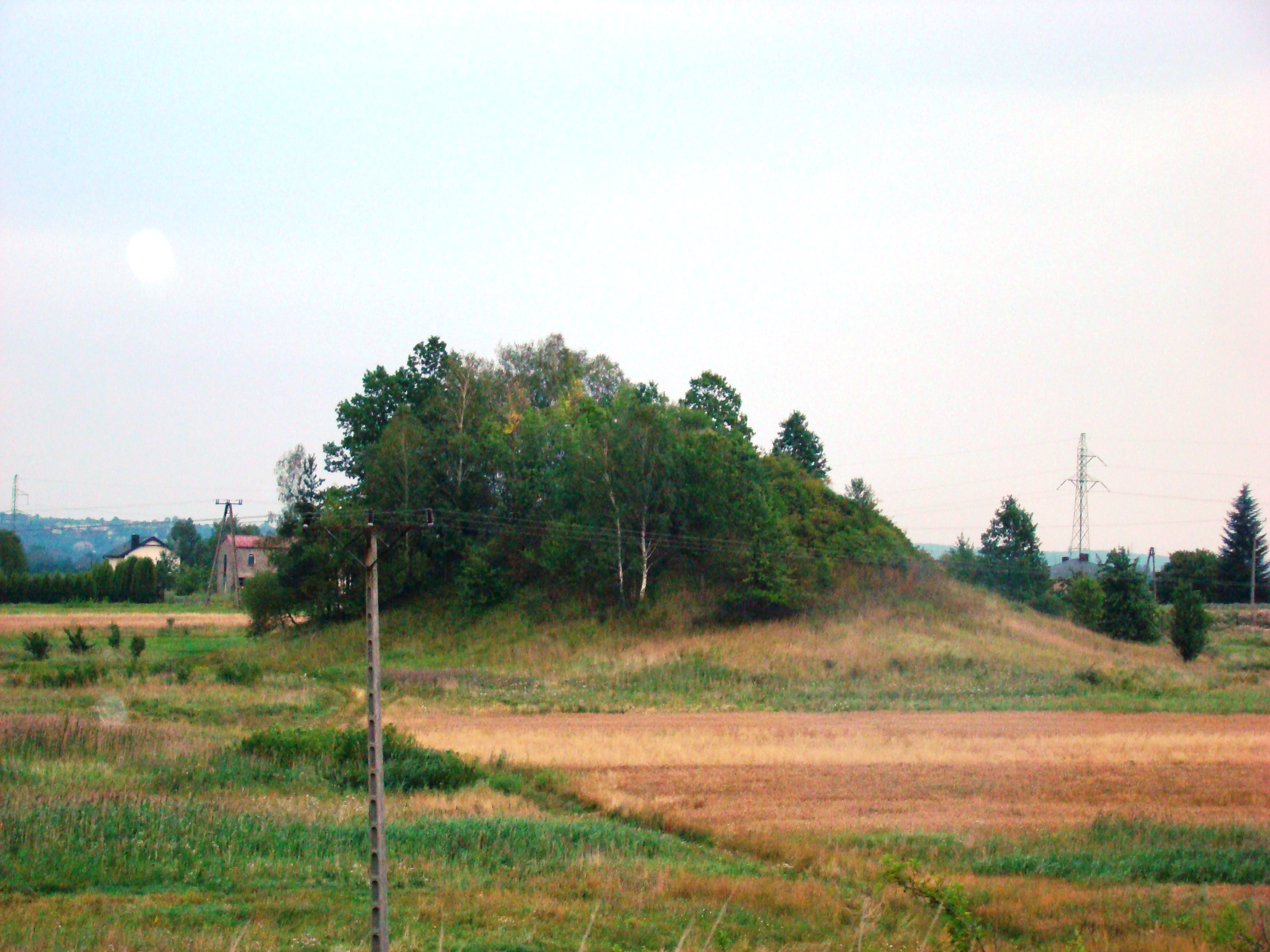 hałda kopalni rud żelaza "Aleksander" w Jastrzębiu